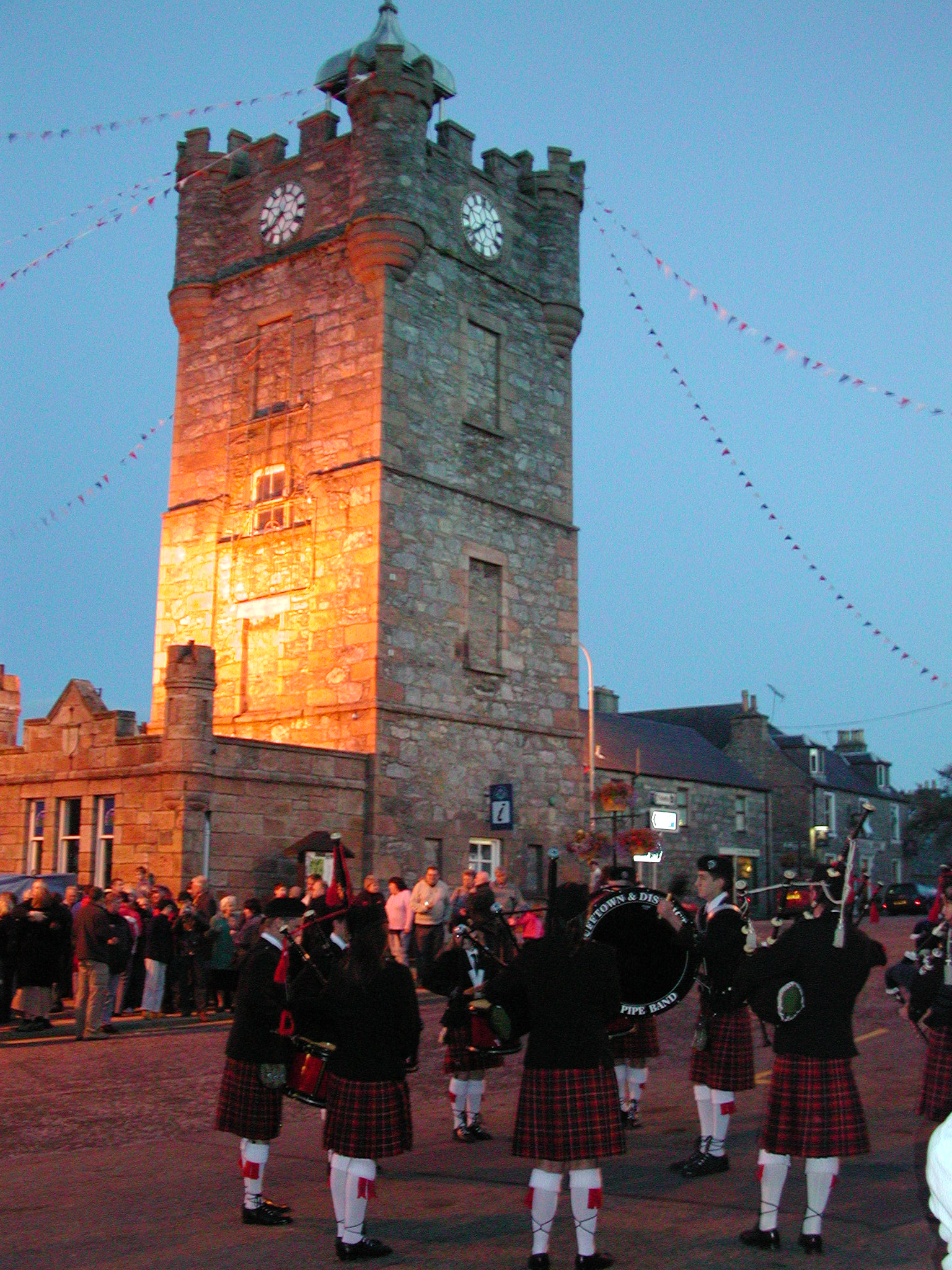 Klocktornet i mitten av Dufftown var tidigare ett fängelse.